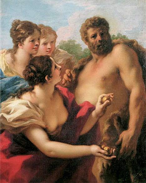 ? × ? cm